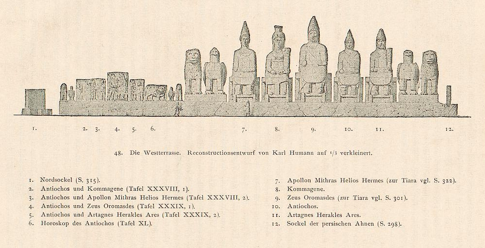 Rekonstruktion der Dexiosisreliefs und Monumentalstatuen der Westterrasse am Nemrut Dağı, Türkei von Carl Humann und Otto Puchstein, 1890. Die Identifikation der Statuen von Antiochos und Apollon ist nach neuerer Forschung vertauscht.